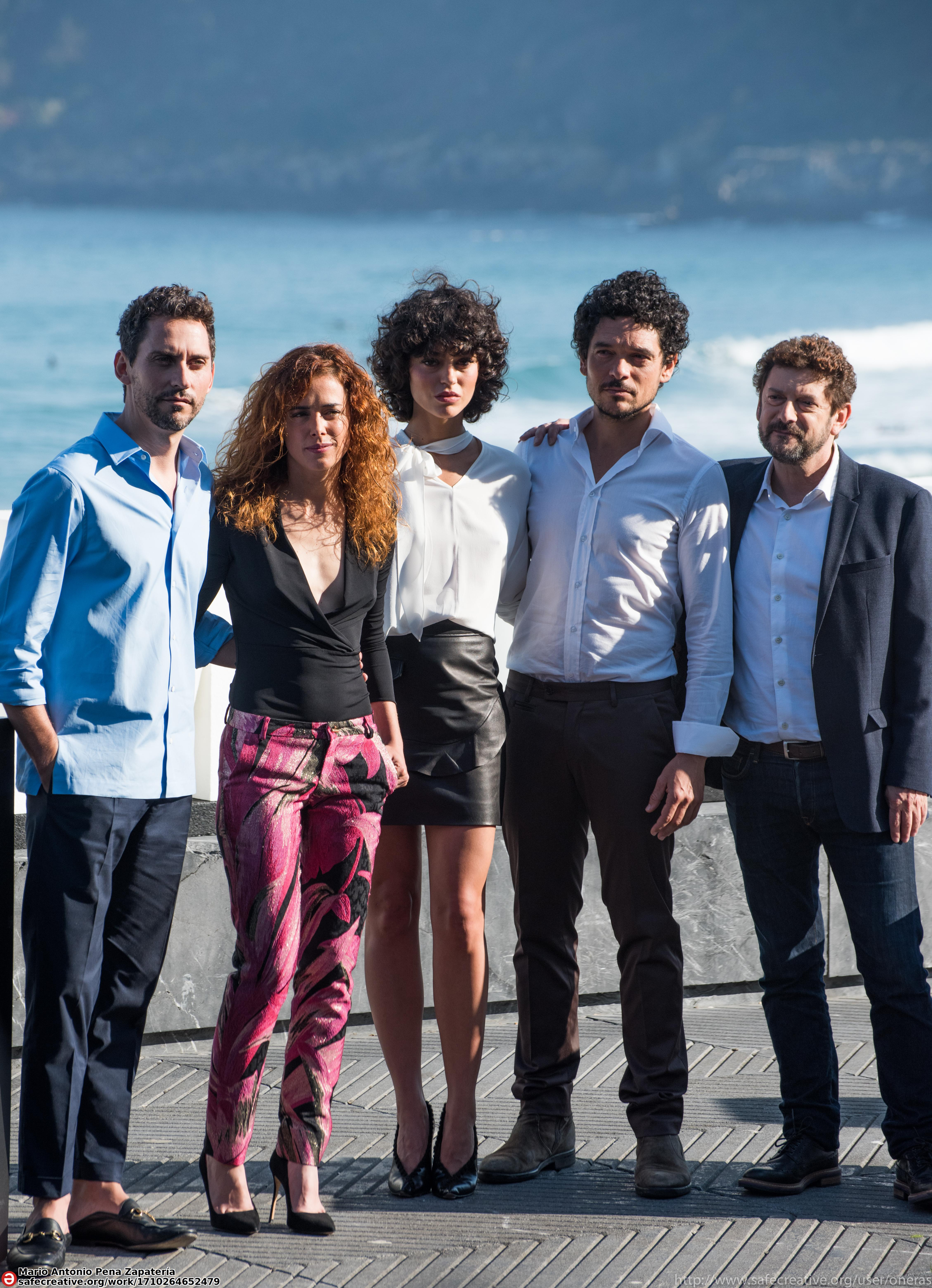 Reparto de la serie La peste, durante el festival de San Sebastián de 2017.